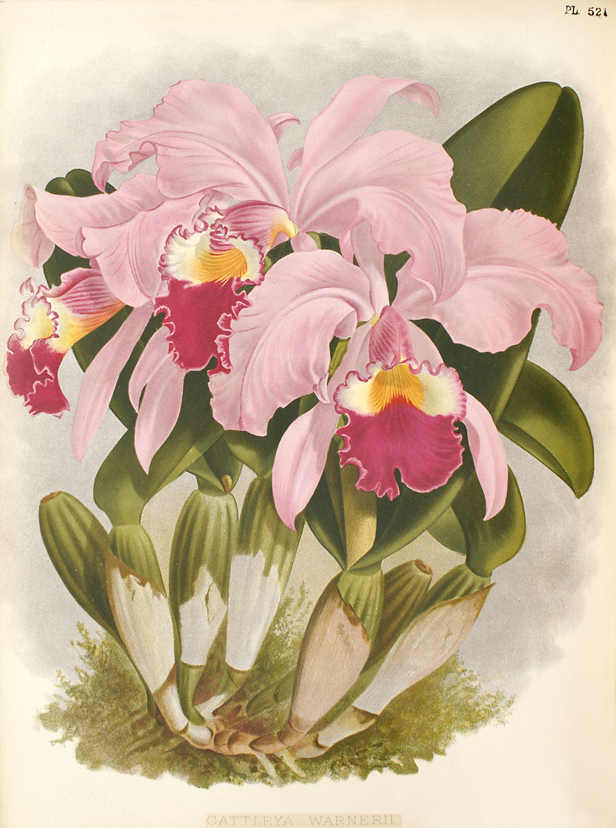 Каттлея Варнера